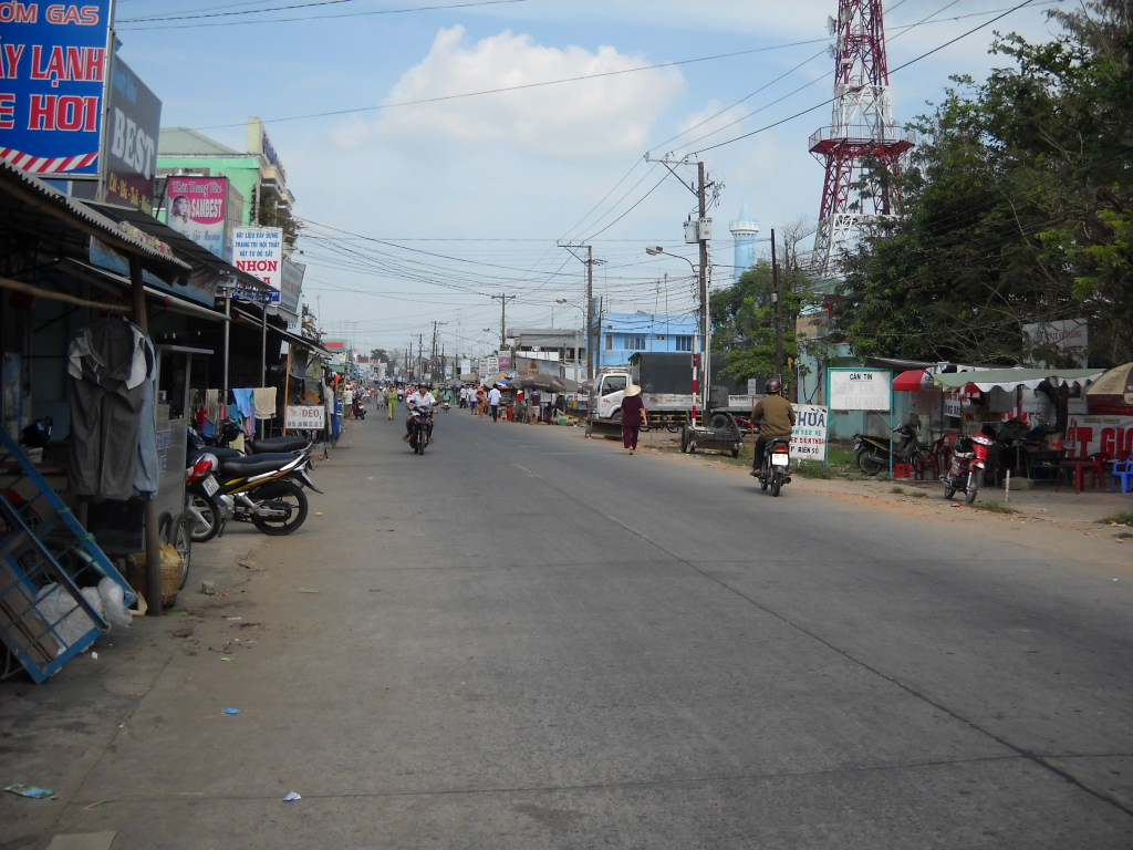 Thị trấn Thứ Ba, An Biên